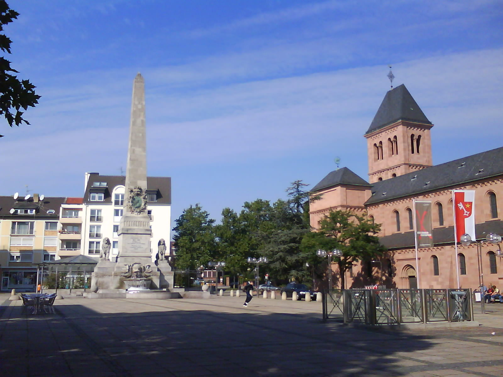 Worms, Luwigplatz mit dem Ludwigsdenkmal